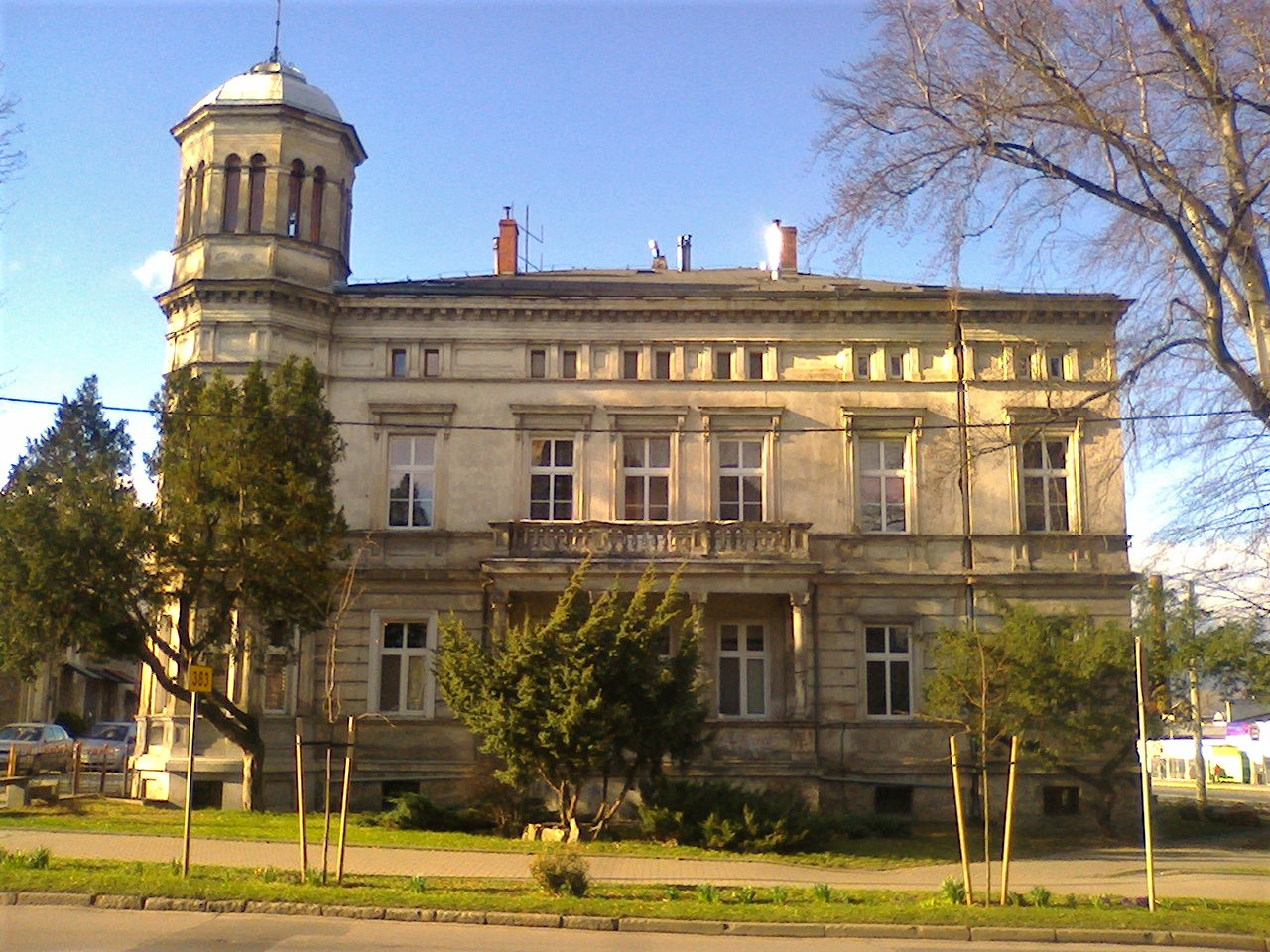 Dzierżoniów, ul. Świdnicka